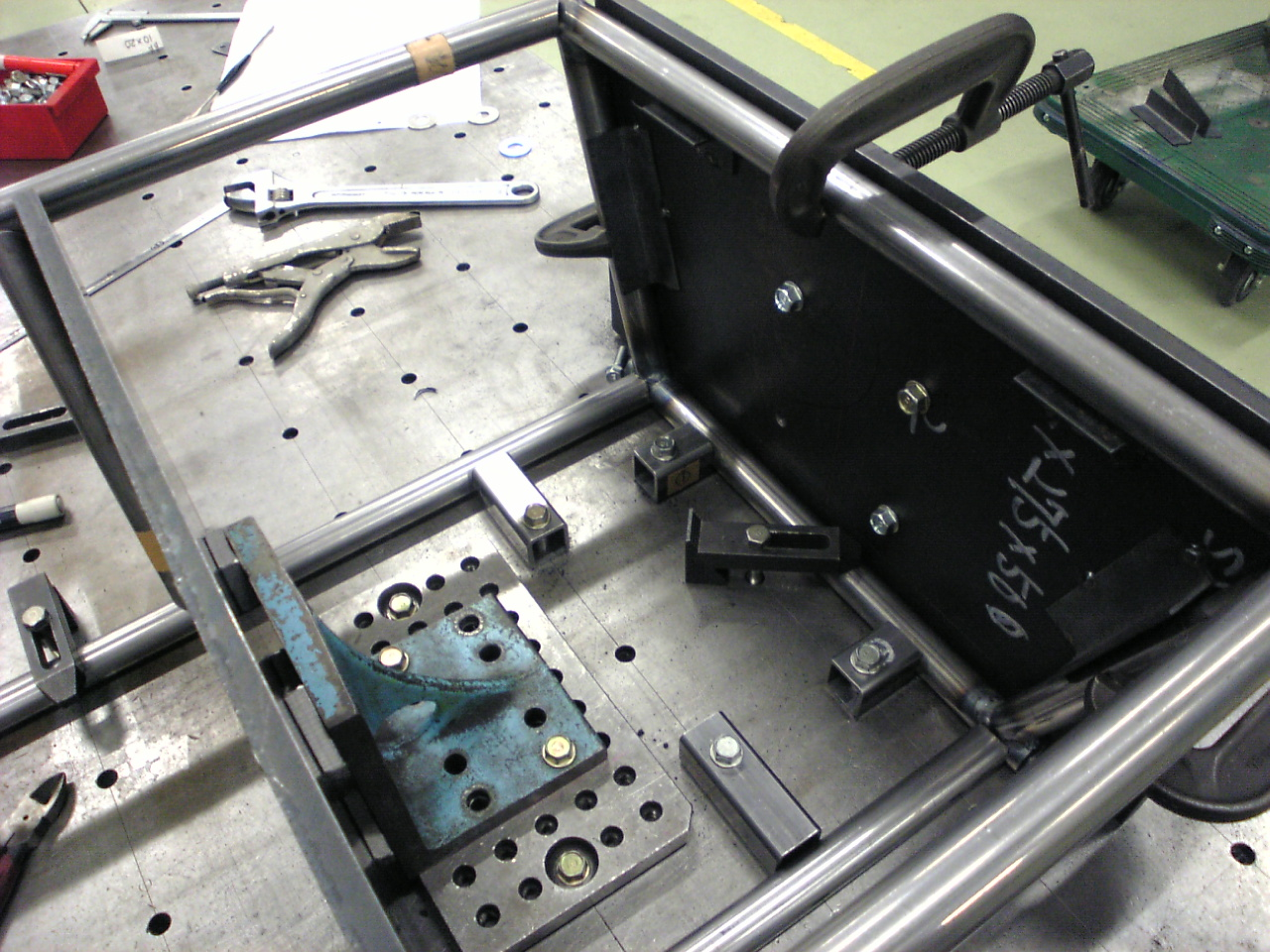 治具